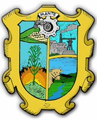 Escudo del Municipio de El Mante, Tamaulipas, México